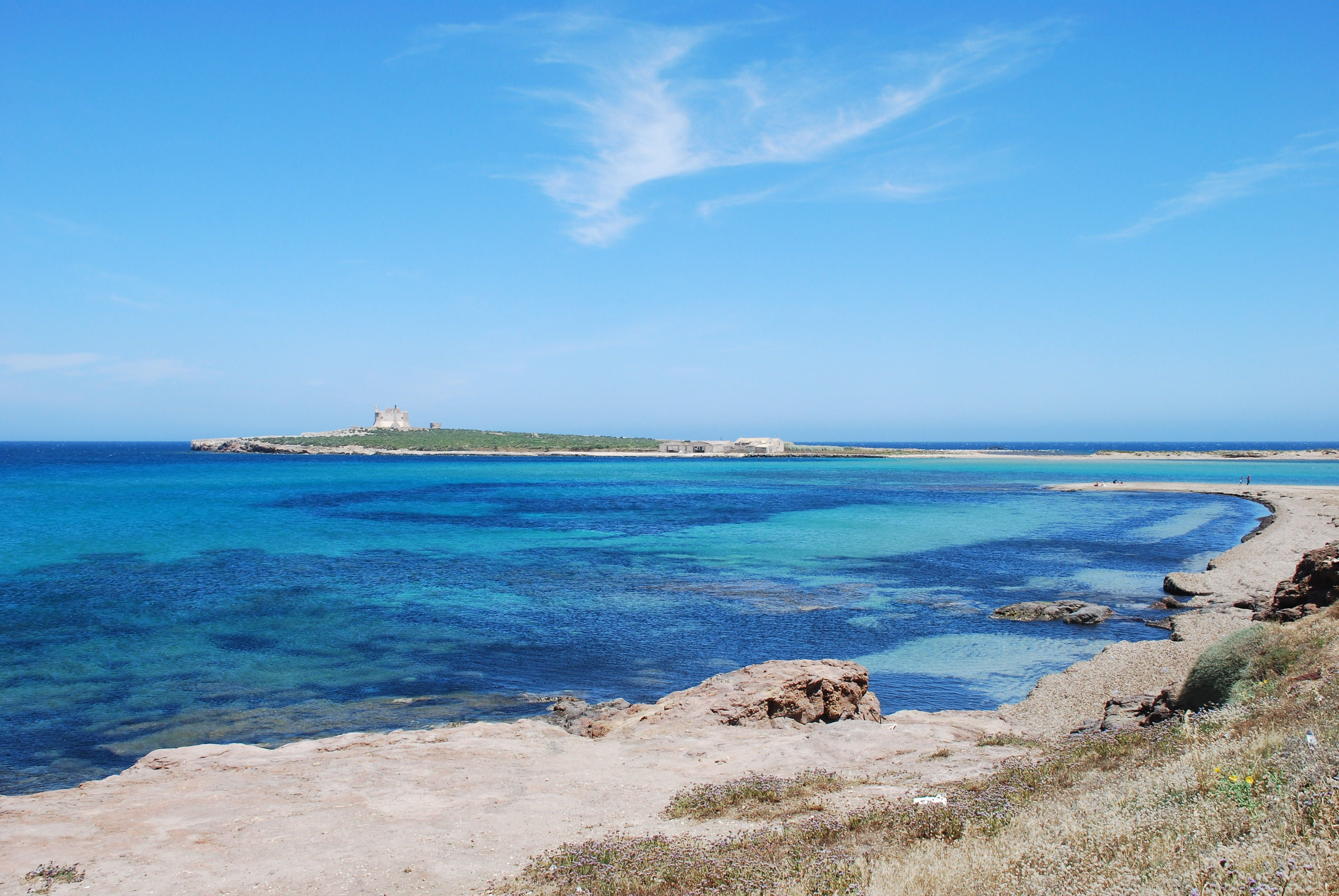 Sicilia - Portopalo di Capo Passero